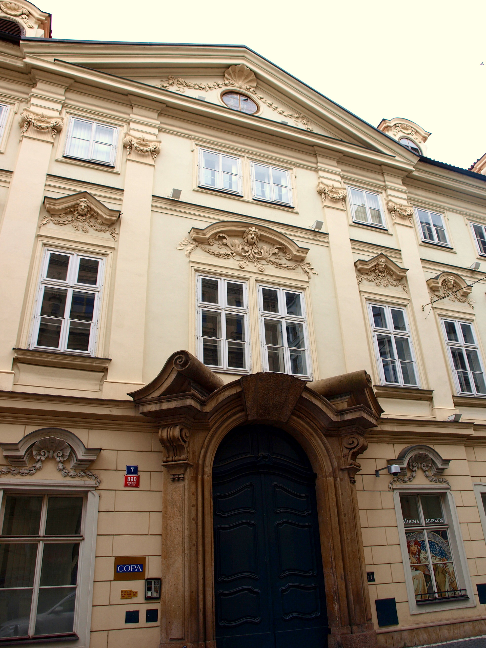 Kaunický palác Panská 7.